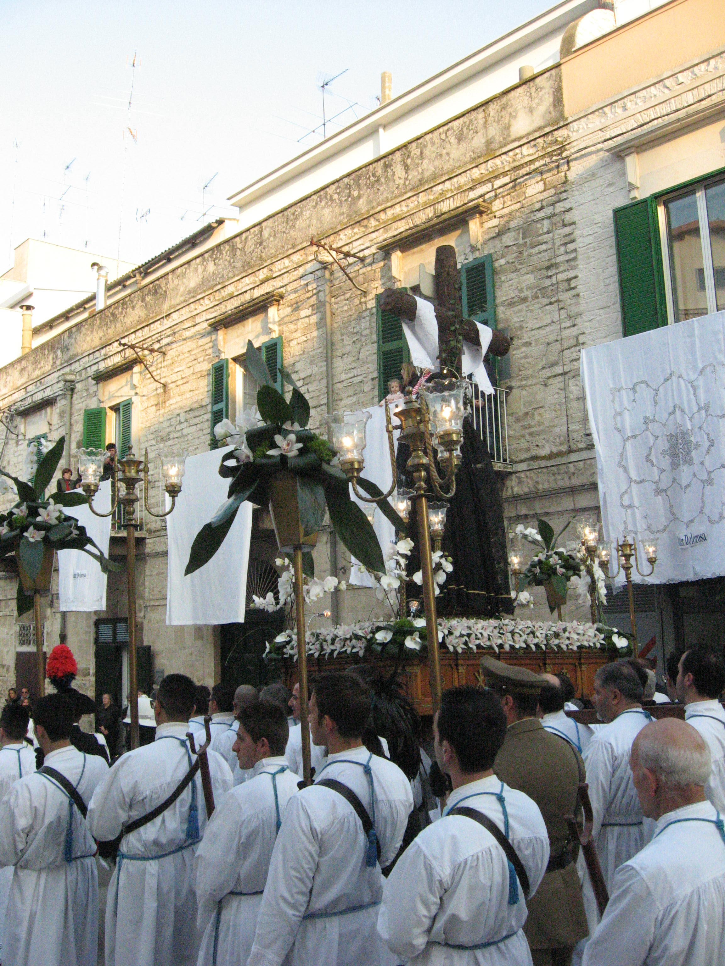 Processione della Desolata, Ruvo di Puglia